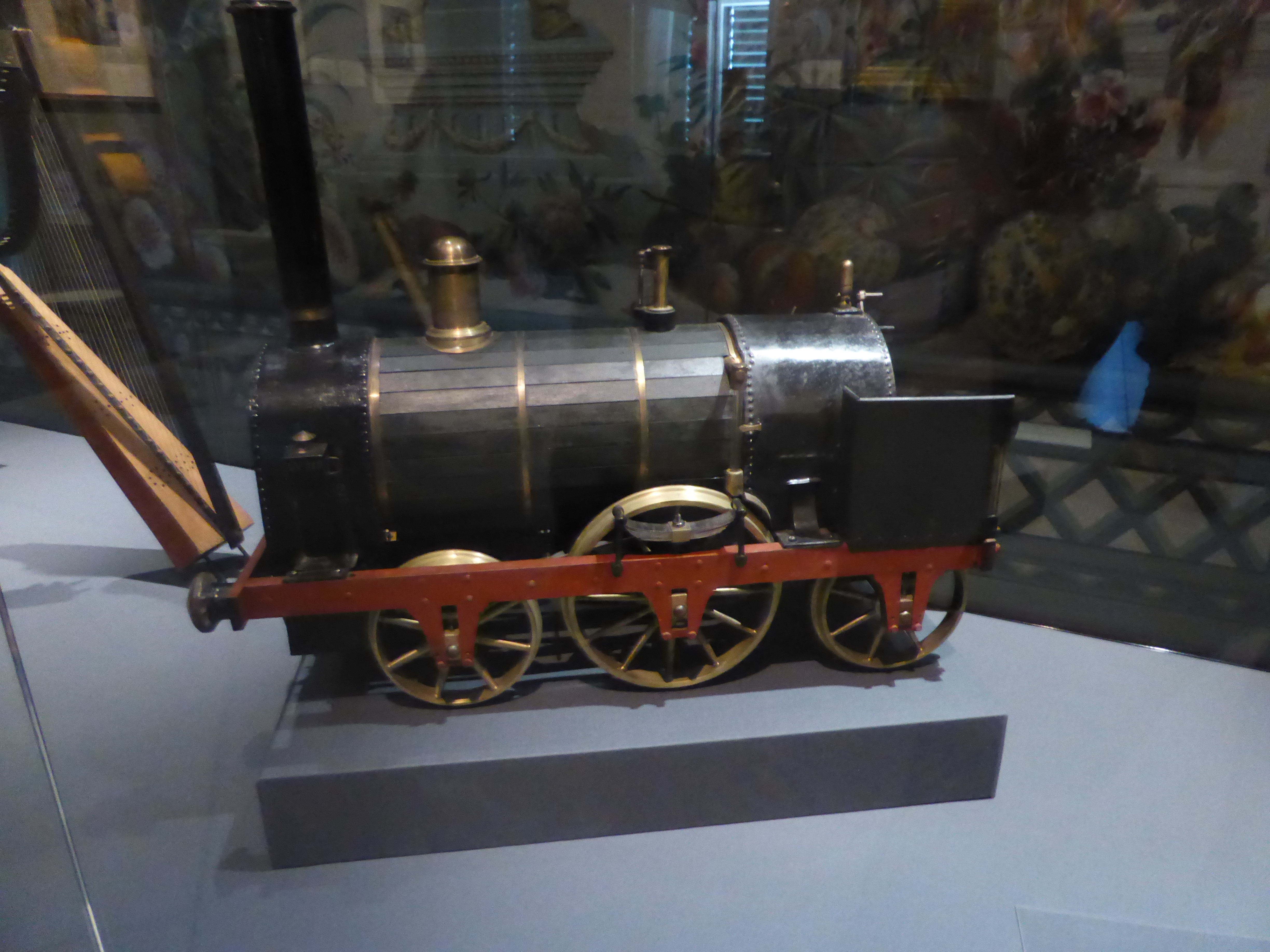 Spielzeuglokomotive Kaiser Franz Josephs des I.